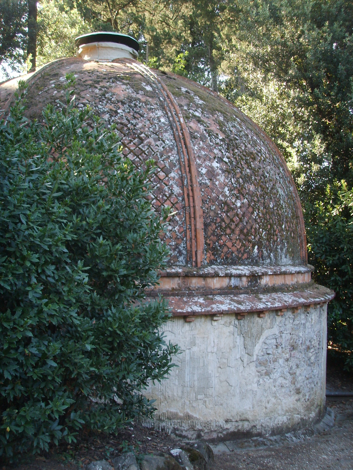 Ghiacciaie di Boboli